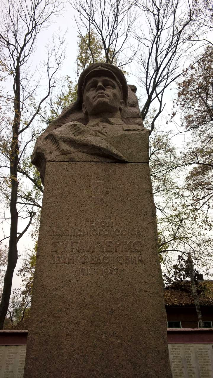 Гранітний пам'ятник-бюст Герою Радянського Союзу Івану Федотовичу Бугайченку. Встановлений у селі Потіївка (Радомишльського району).